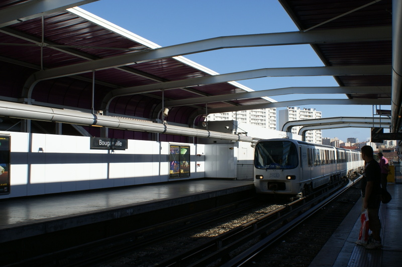 Station "Bougainville" du métro de Marseille.